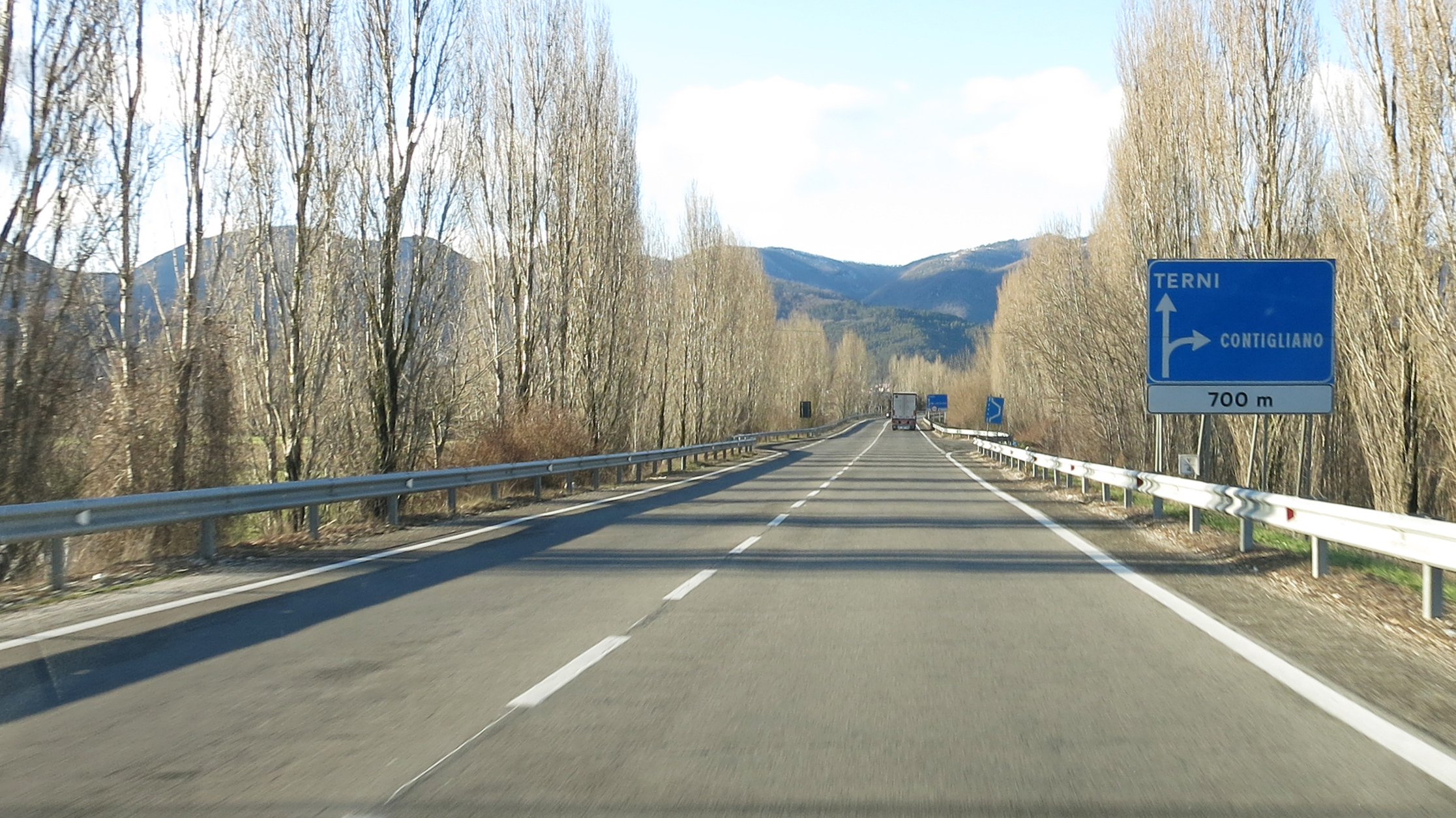 Svincolo di Contigliano posto sulla strada statale 79 Ternana (superstrada Rieti-Terni) fotografato in direzione Terni